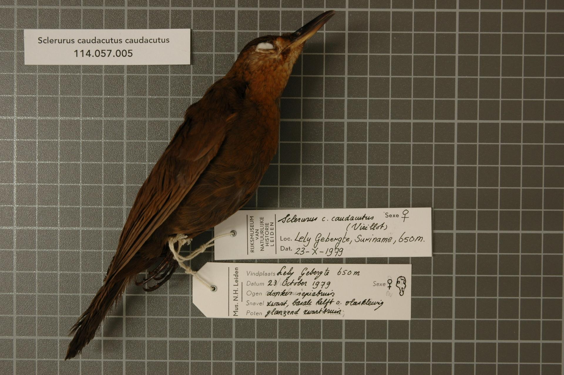 Sclerurus caudacutus caudacutus (Vieillot, 1816)